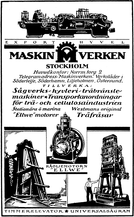 Svenska Maskinverken (The Swedish Machine Works), advertisement 1920